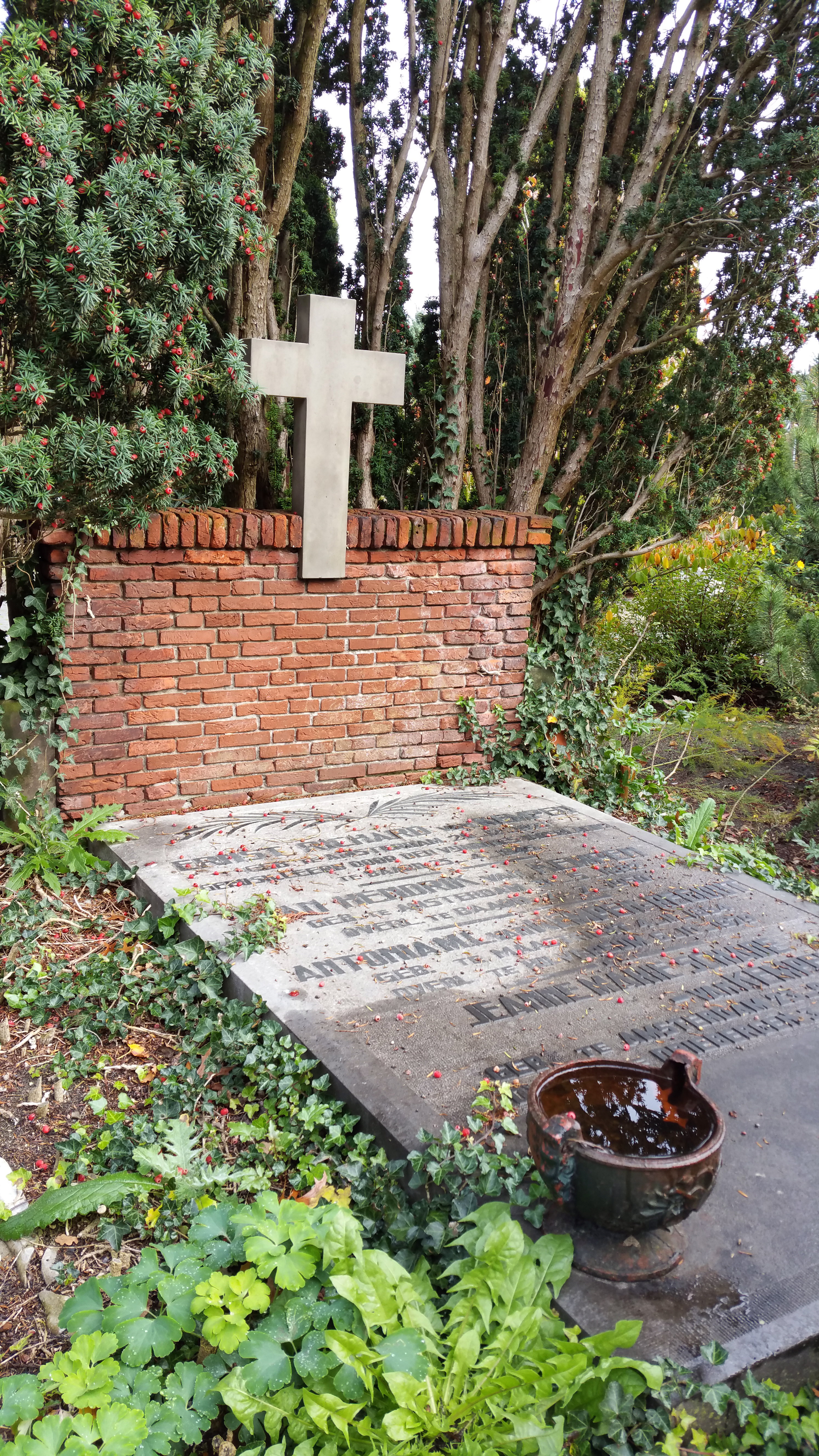 Oorlogsgraf van verzetstrijder Ernst Richard van Kempen op de R.K. begraafplaats Baarn